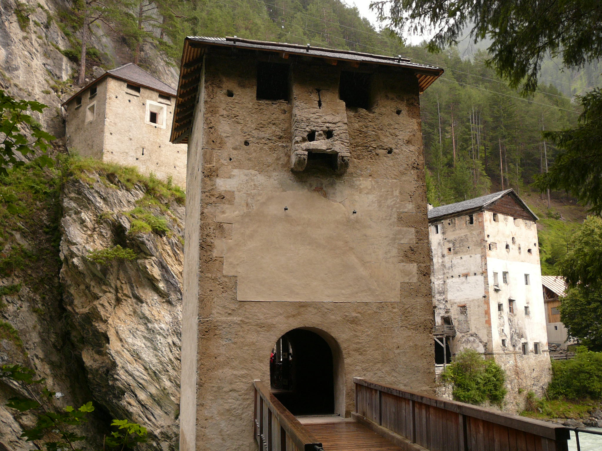 Panorama Finstermünz